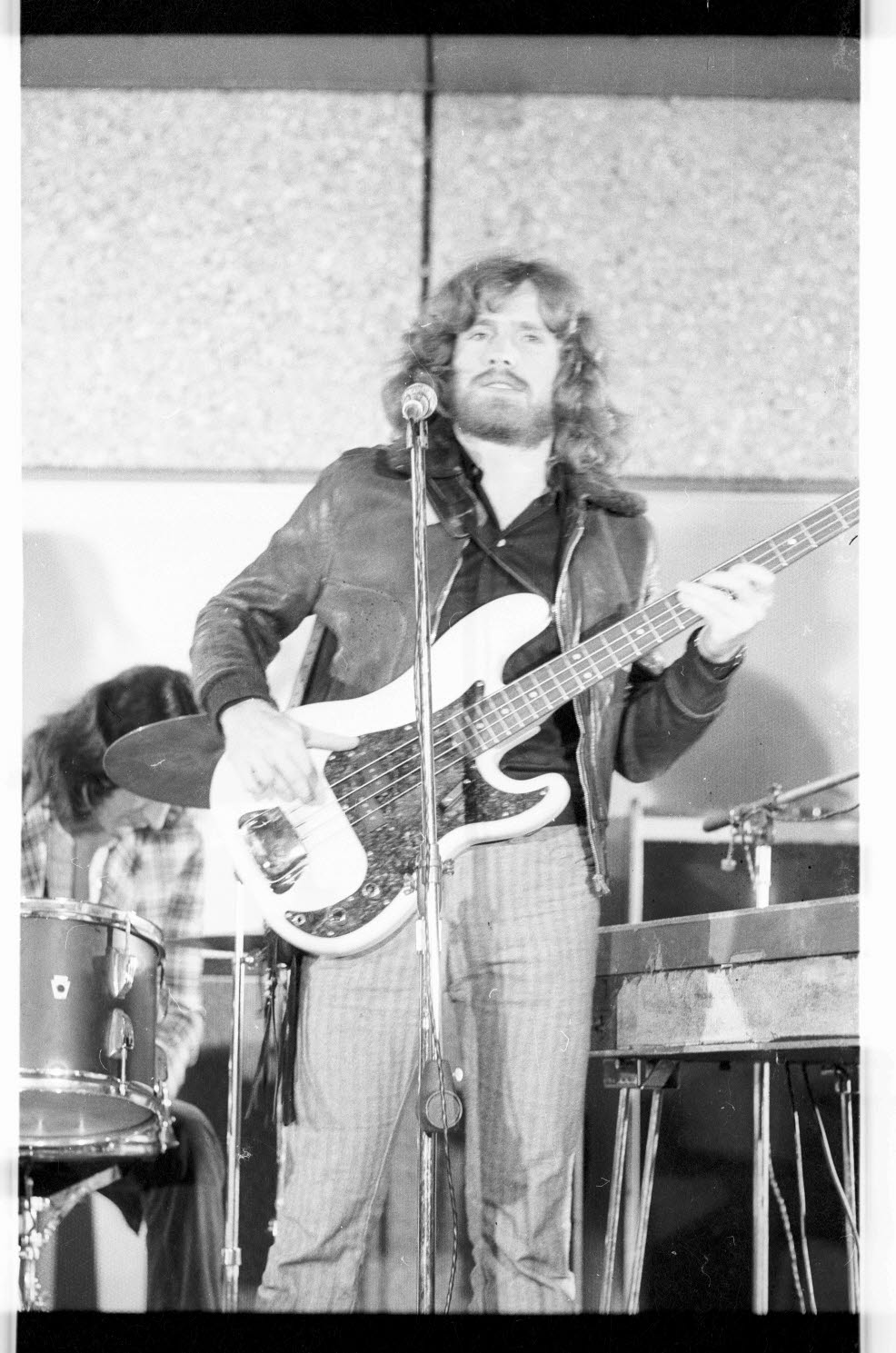 in der Neuen Mensa der Christian-Albrechts-Universität (CAU).